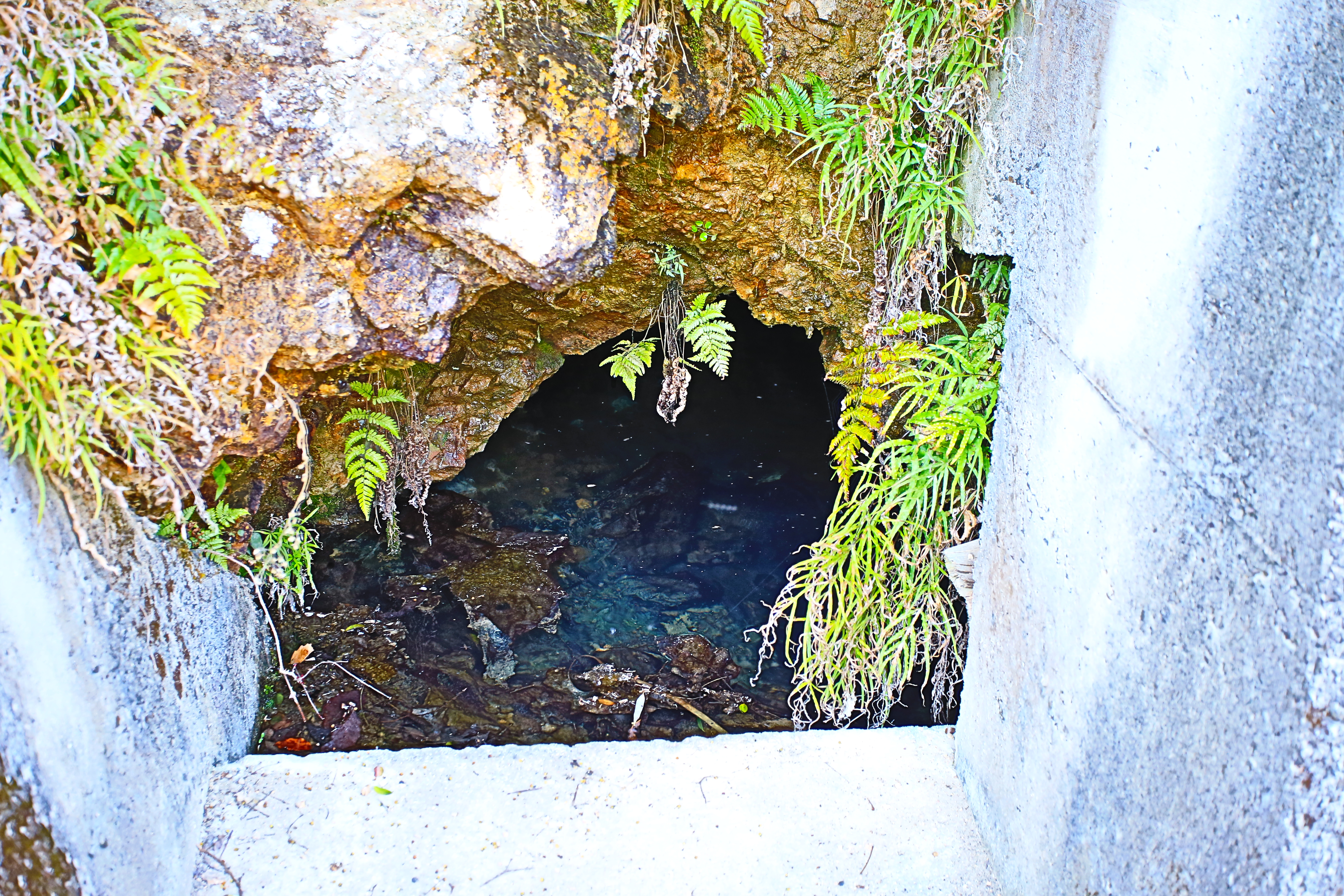 広島県福山市本郷町の大谷鉱山（銅山）の坑道口。広島県道158号線沿い。